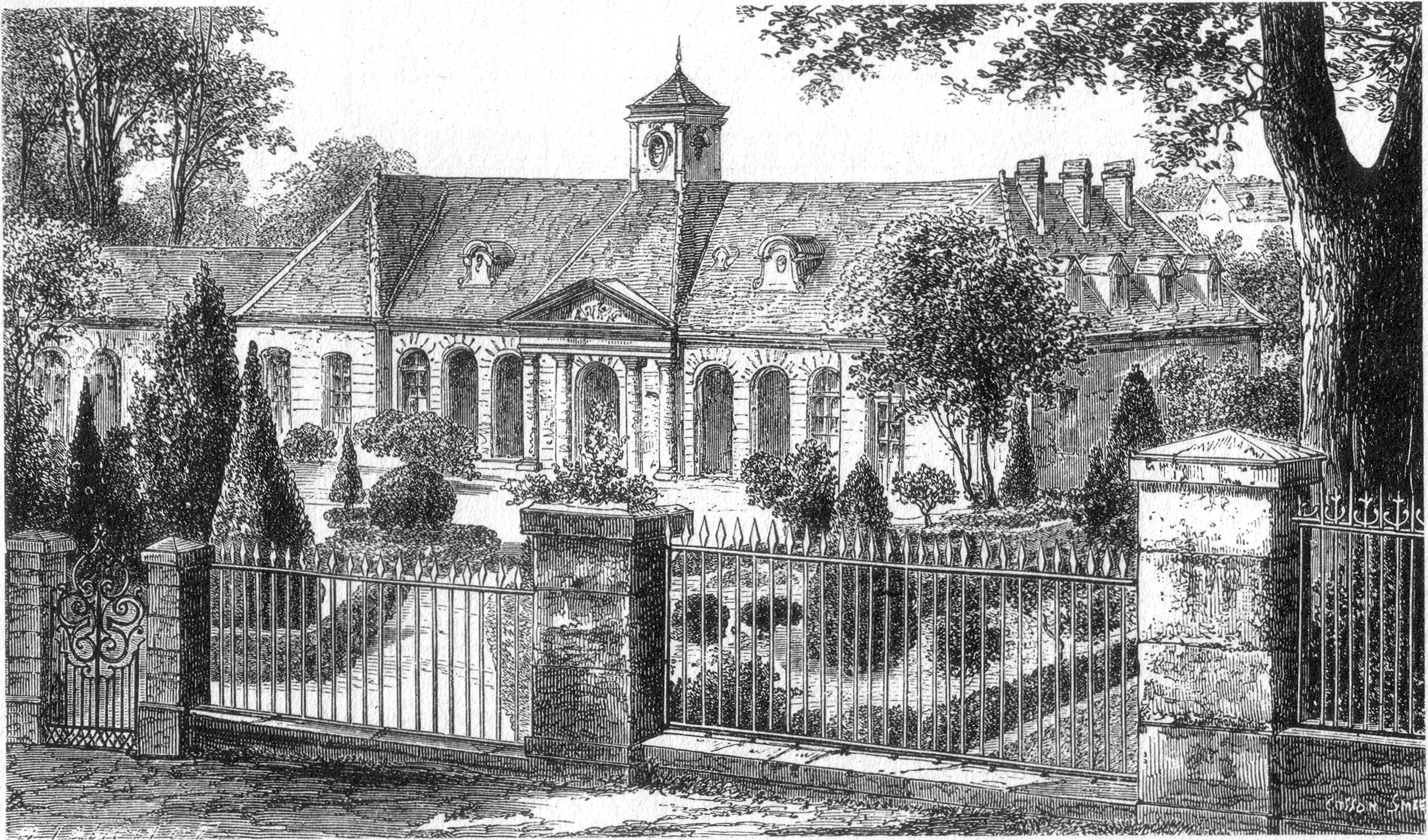 Cf. titre